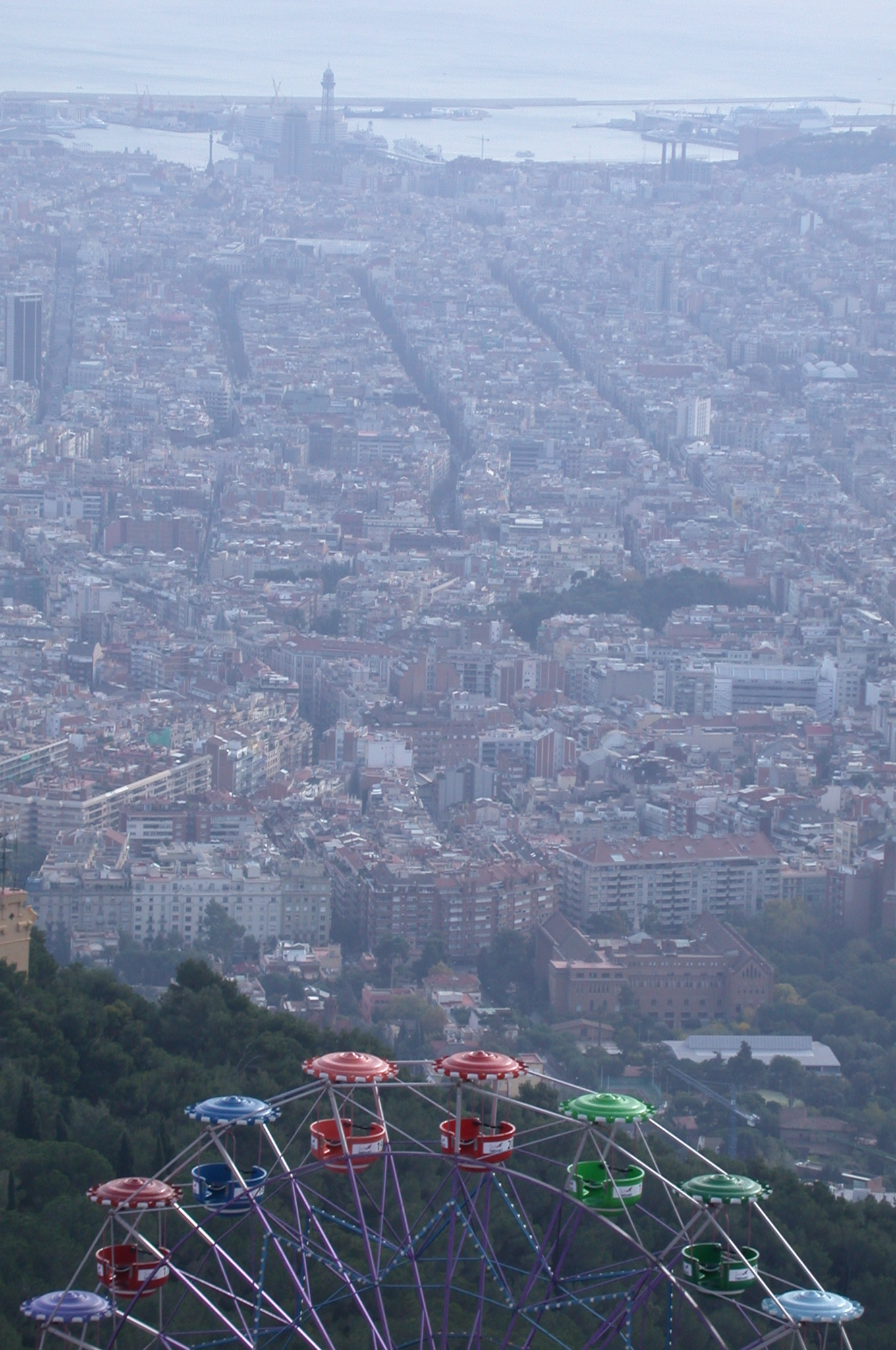 Barcelona des del Tibidabo, Catalunya